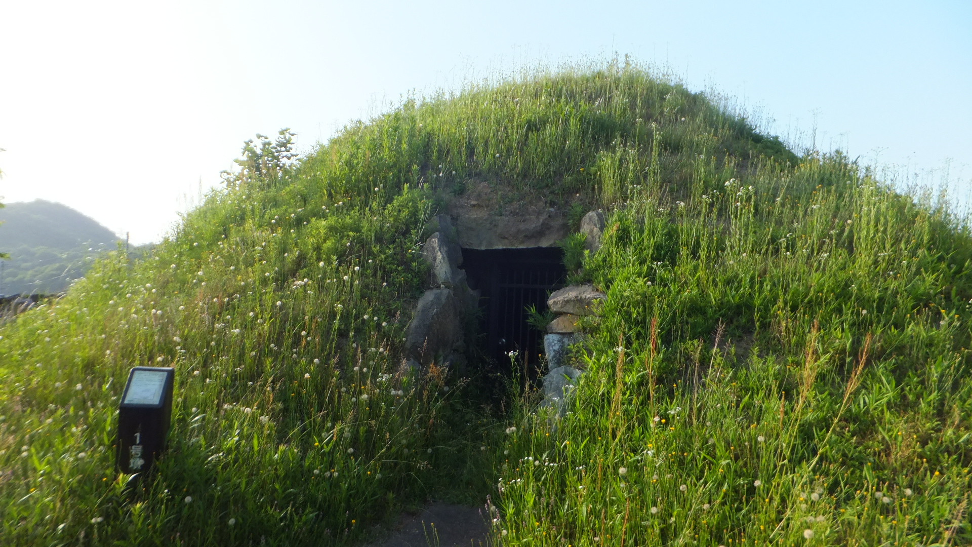 正法寺古墳公園